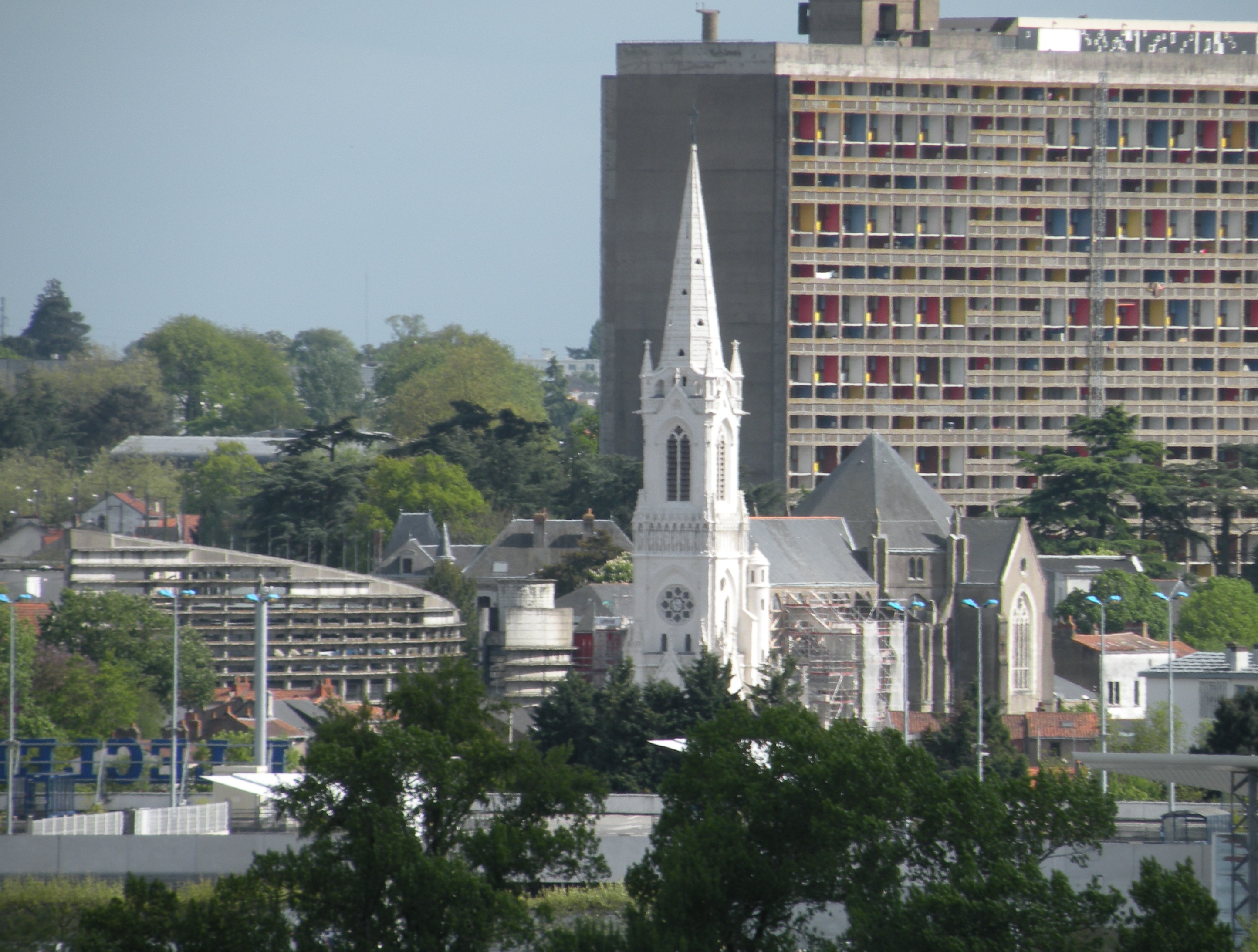 Le centre-ville de Rezé : mairie, église Saint-Pierre et Cité Radieuse